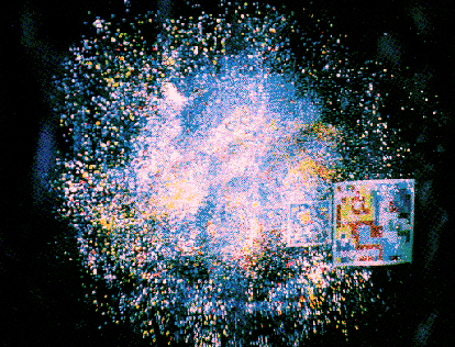 Illustration créée dans le cadre du concours du Symbole France-Japon (projet lauréat de la première phase)